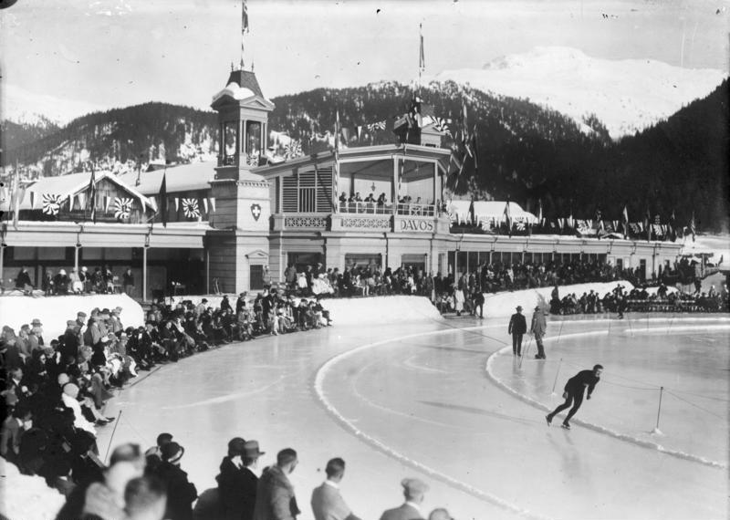 Internationales Eisschnellaufen in Davos! Blick auf die große Eislaufbahn in Davos während der Konkurrenz.